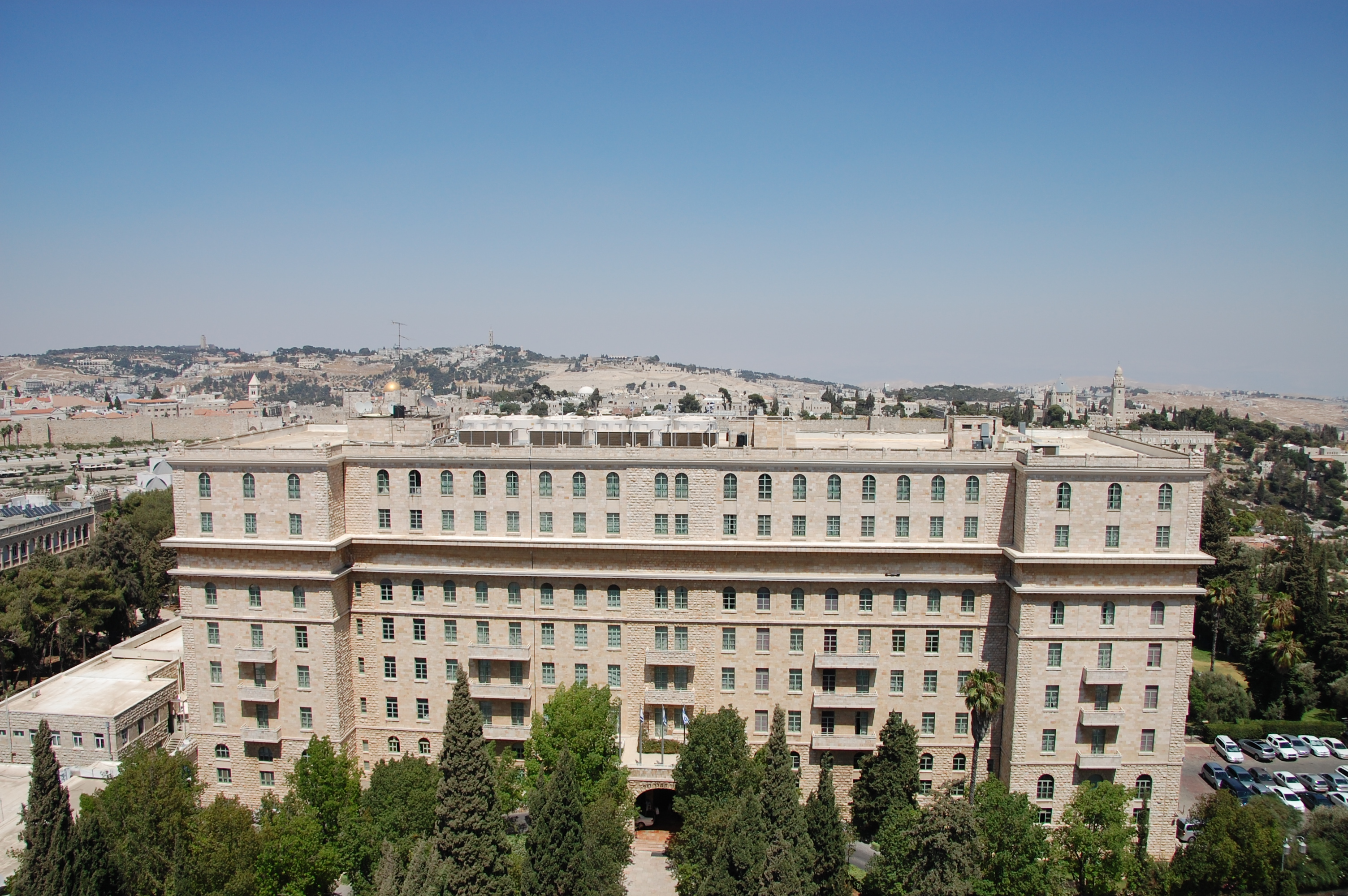 מלון המלך דוד הוא בית מלון ברחוב המלך דוד 23 במרכז ירושלים הצופה אל העיר העתיקה והר ציון. ראשיתו כמלון פאר בימי המנדט הבריטי, ועד היום הוא נחשב מהבולטים והיוקרתיים שבמלונות ישראל.